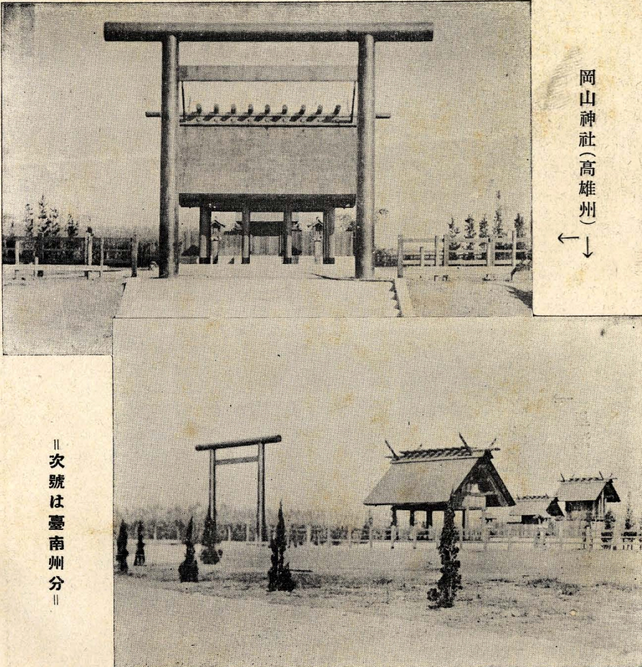 中文（台灣）: 岡山神社，位於台湾高雄州岡山街